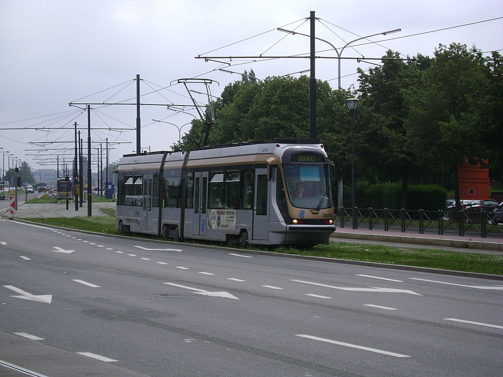 A 62-es villamos a Da Vincinél, Brüsszelben.